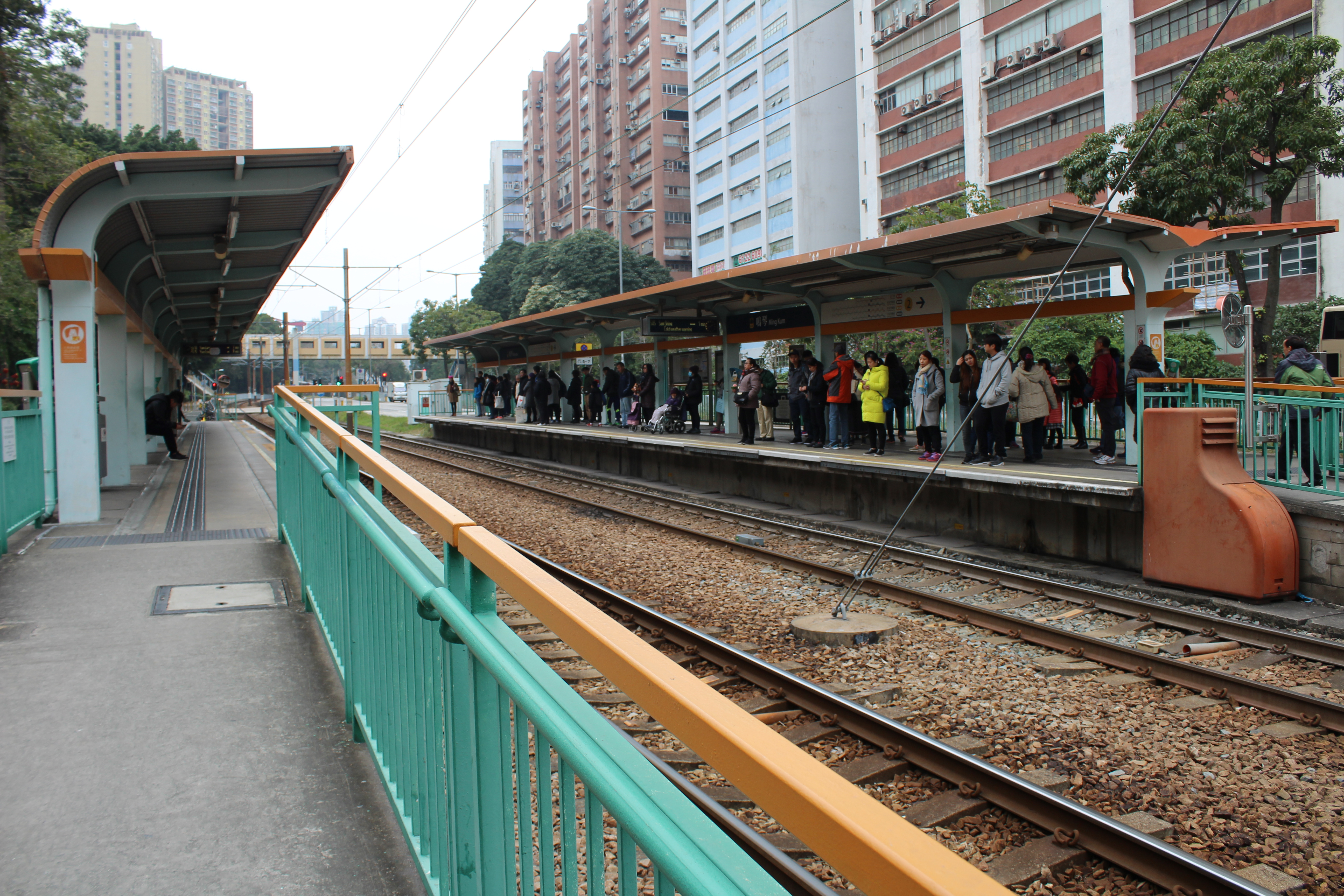 鳴琴站月台